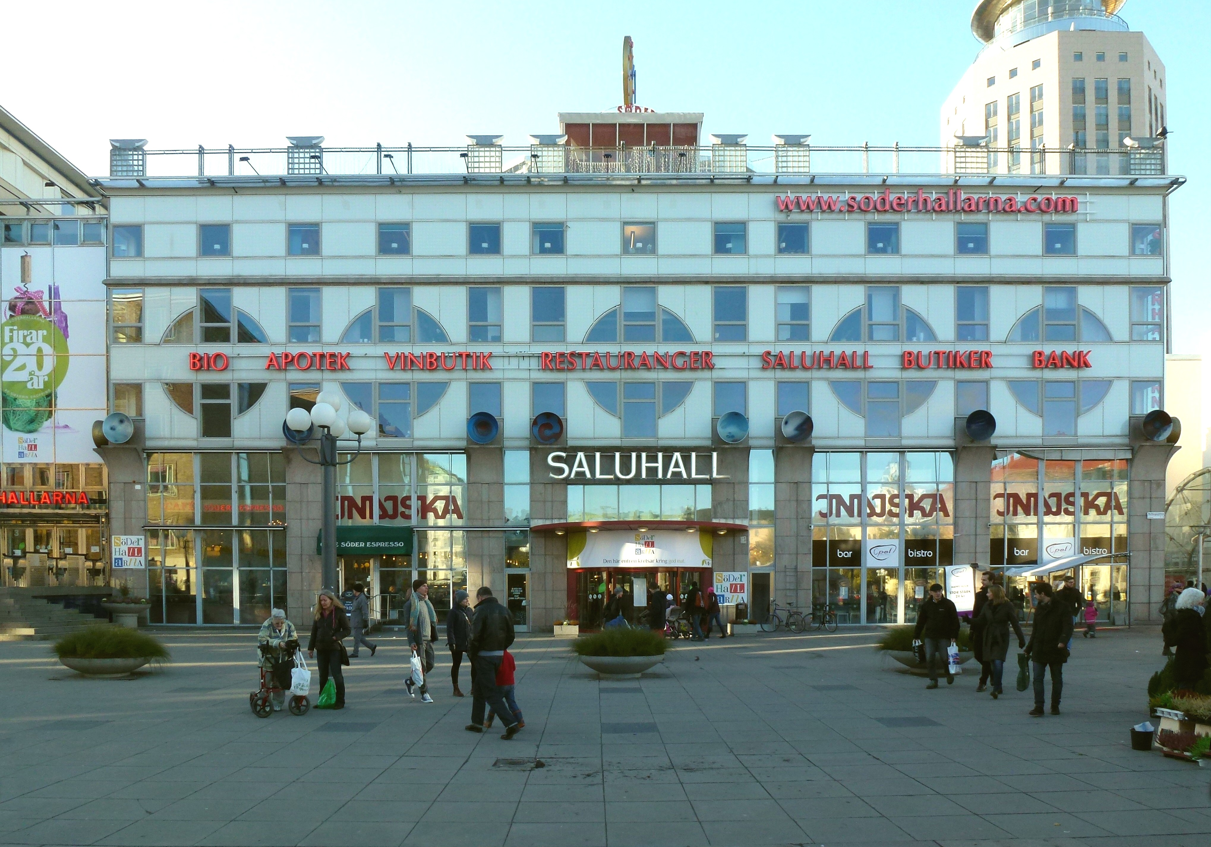 Södermalms saluhall, fasad mot Medborgarplatsen